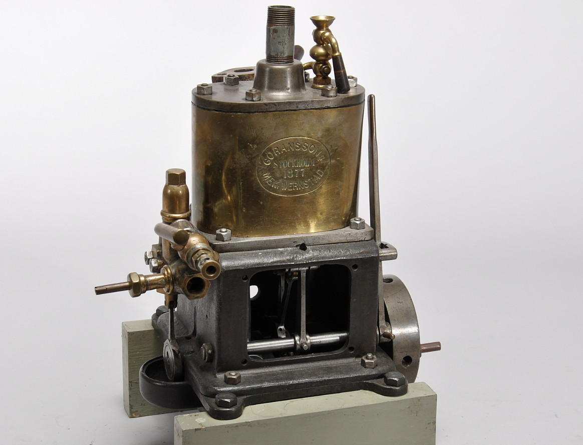 Göranssons mekaniska verkstad, ångmaskin. Kolibrin är en 2-cyl ångmaskin som var vanlig i små ångslupar under sista delen av 1800-talet. Maskinen utvecklade ca 4 hk (3 KW).